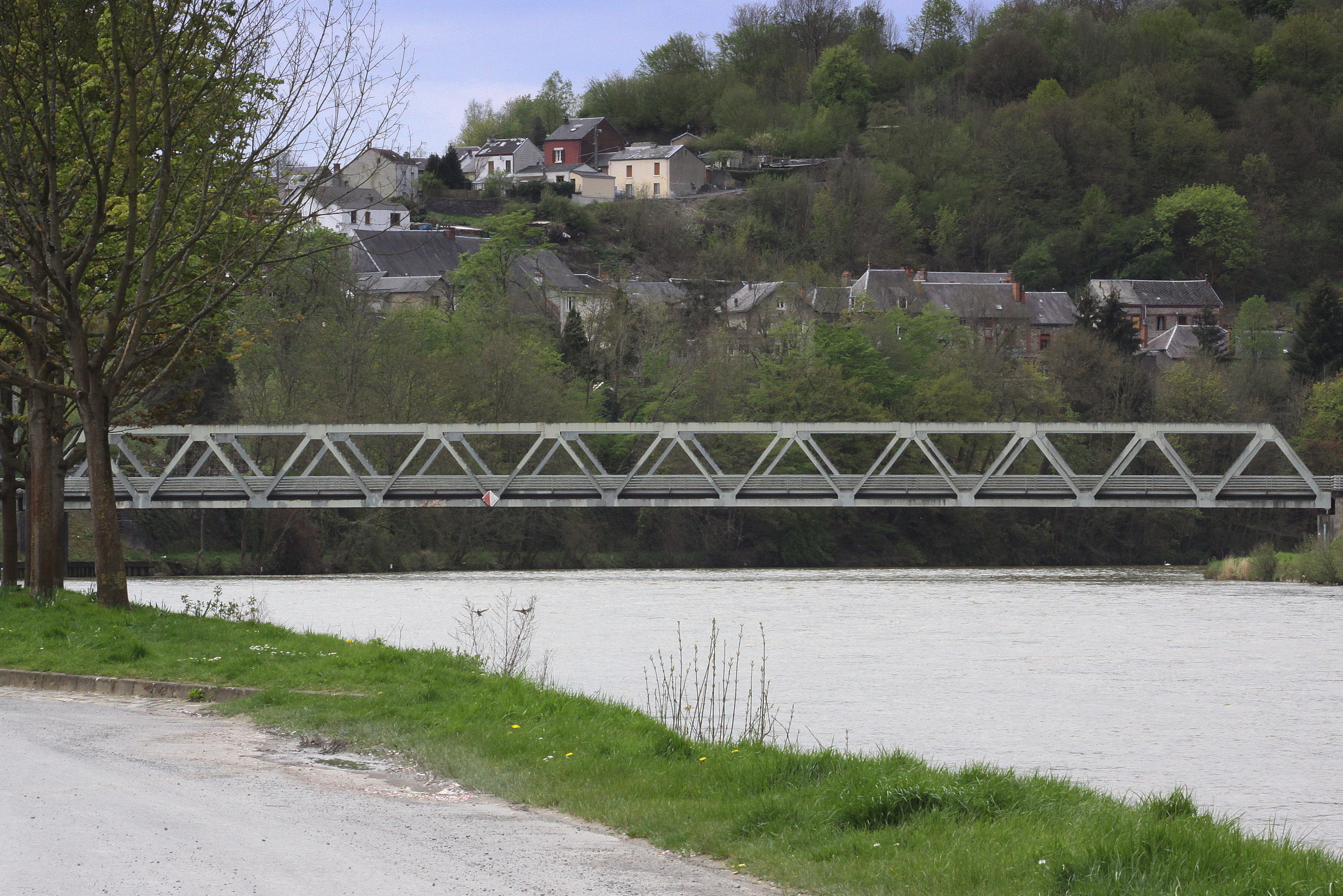 Bréck vu Fumay